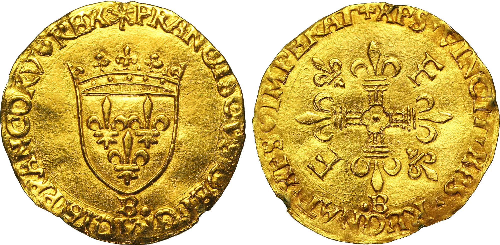 Nom de l'atelier : Rouen Métal : or Titre en millième : 958‰ Diamètre : 26,8mm Axe des coins : 11h. Poids : 3,43g. Titulature avers : (soleil) FRANCISCVS. DEI. GRACIA. FRANCORV (Mm) REX, (ponctuation par simple triangle). Description avers : Écu de France couronné ; lettre d'atelier à la pointe de l'écu. Point secret sous la 15ème lettre. Traduction avers : (François, par la grâce de Dieu, roi des Francs). Titulature revers : + XPS. VINCIT. XPS. REGNAT. XPS (Mm) IMPERAT, (ponctuation par simple triangle). Description revers : Croix fleurdelisée avec quadrilobe en cœur, cantonnée aux 1 et 4 d'un lis, aux 2 et 3 d'une F. Point secret sous la 15ème lettre. Traduction revers : (Le Christ vainc, le Christ règne, le Christ commande)